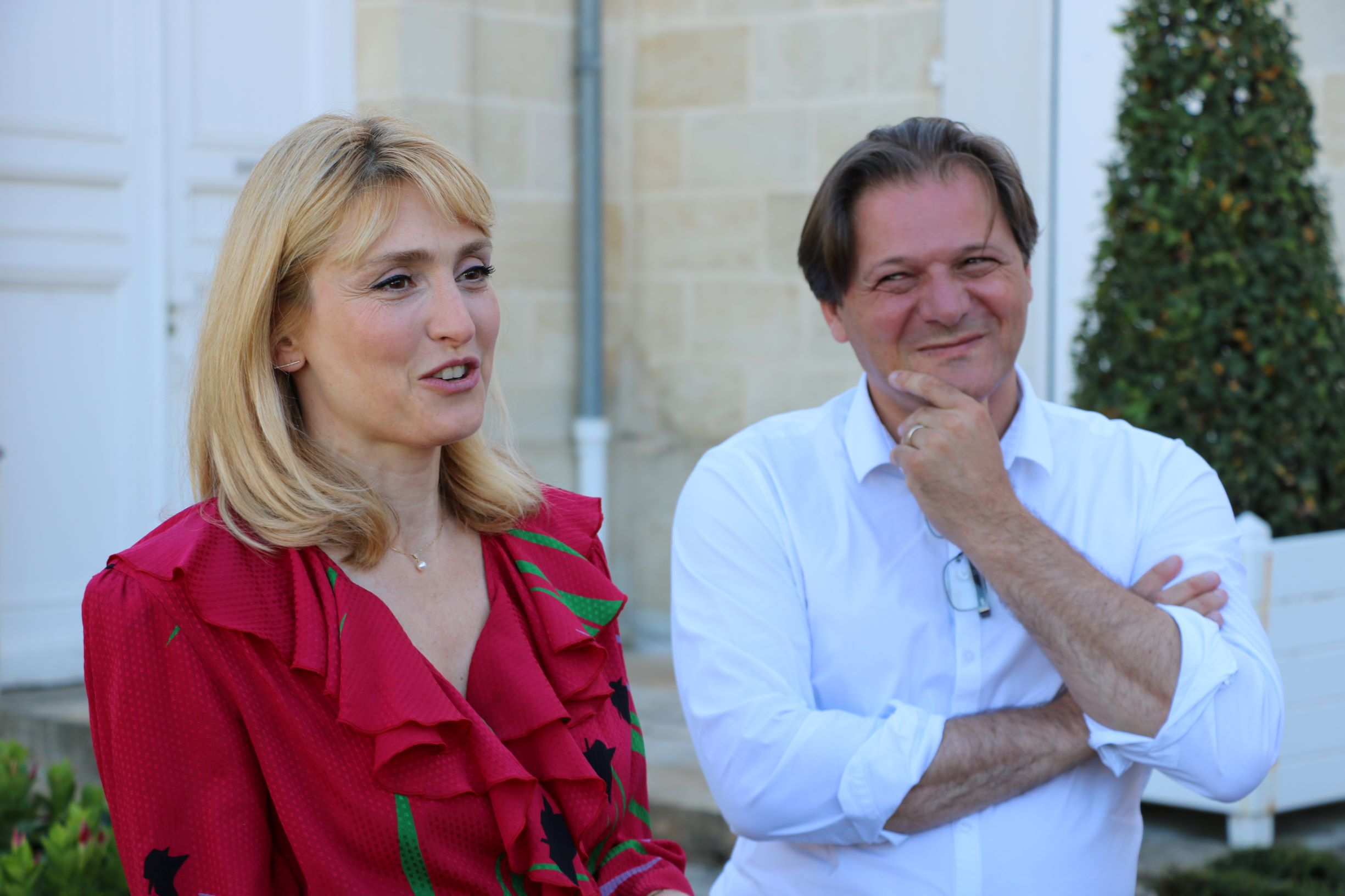 Julie Gayet aux côtés de François Aymé, Président de l'Association Française des Cinémas d'Art & Essai.